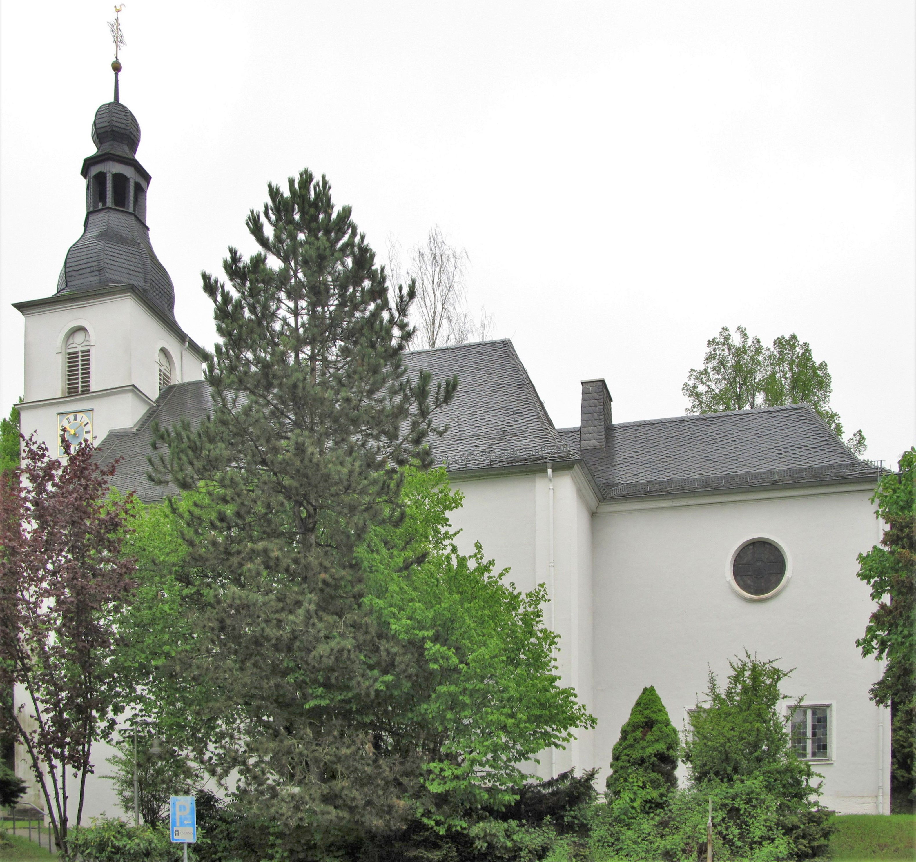 Die evangelische Kirche in Dirmingen, einem Ortsteil der Gemeinde Eppelborn, Landkreis Neunkirchen, Saarland.